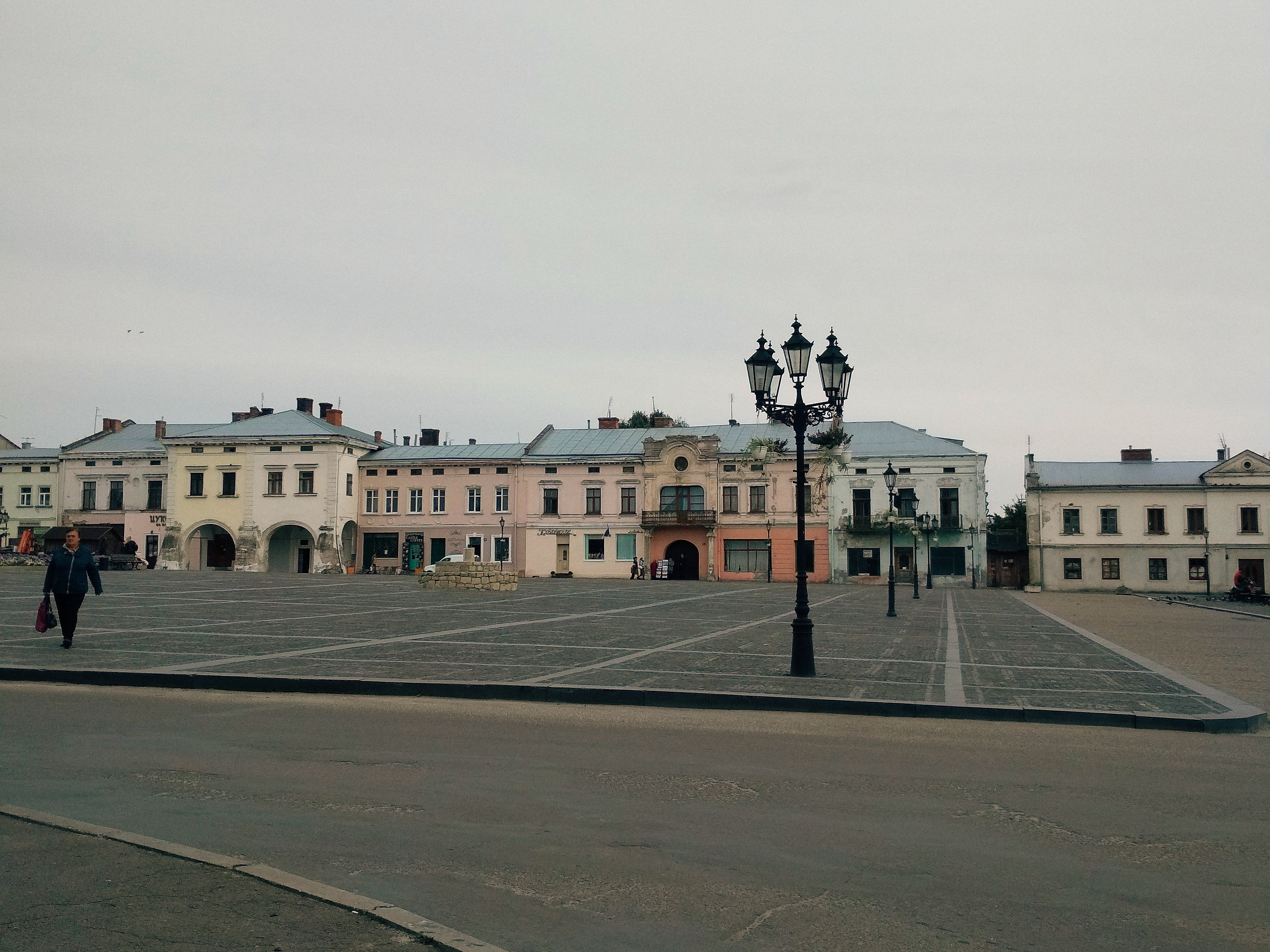 Żółkiew - Rynek